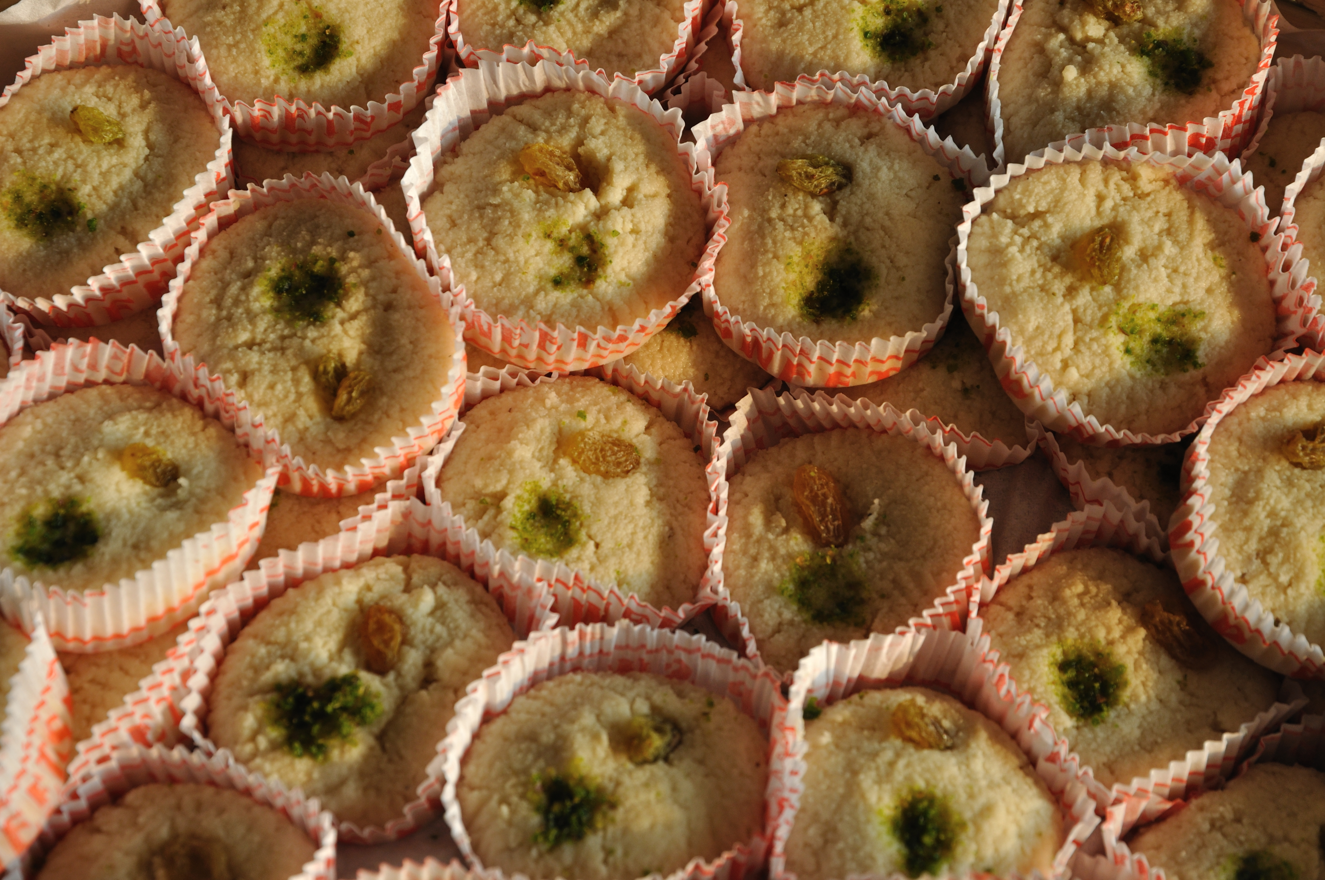 Photographed at Kolkata.